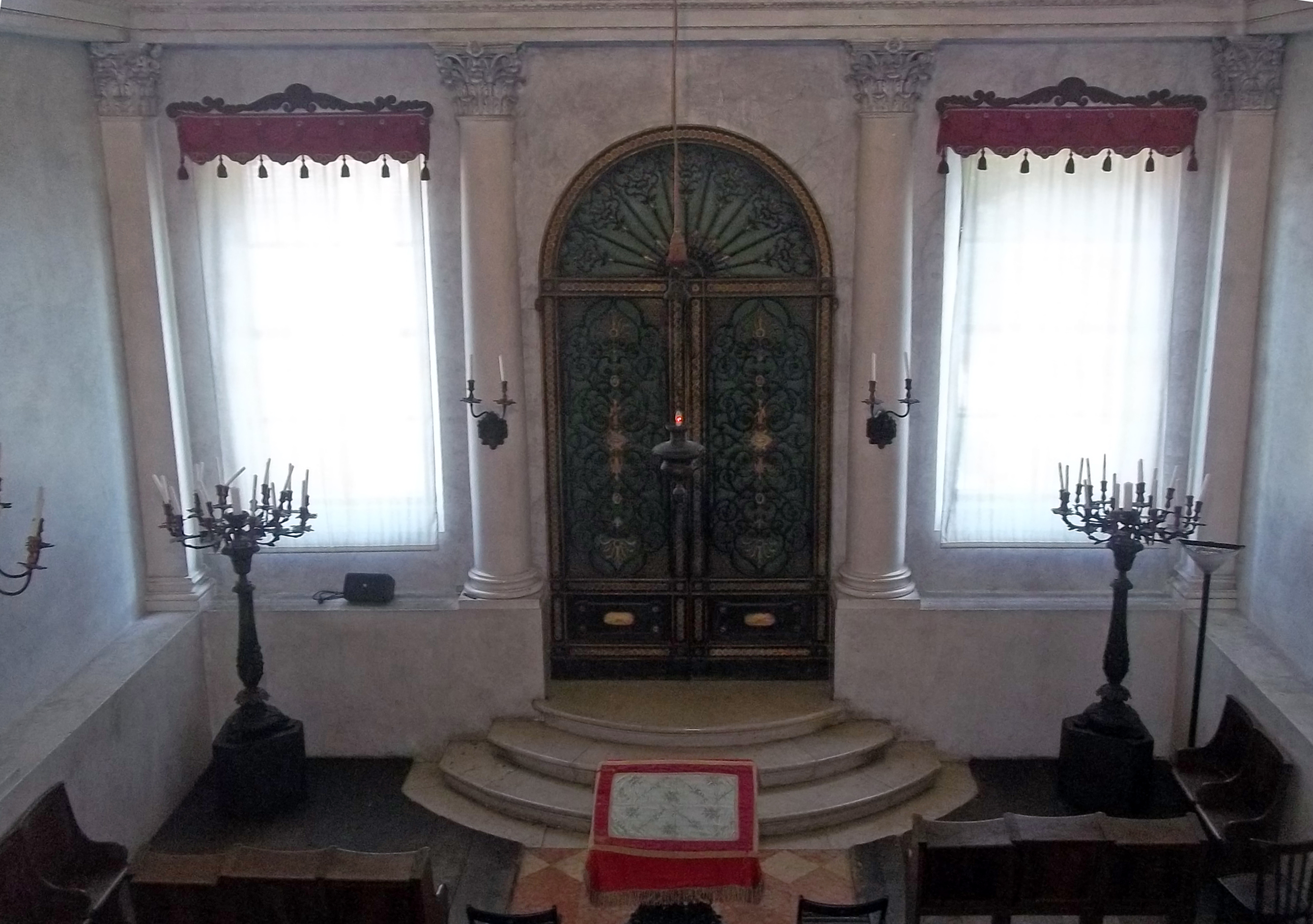 המוזיאון העברי על-שם פאוסו לוי ובית הכנסת בעיר סריאנה